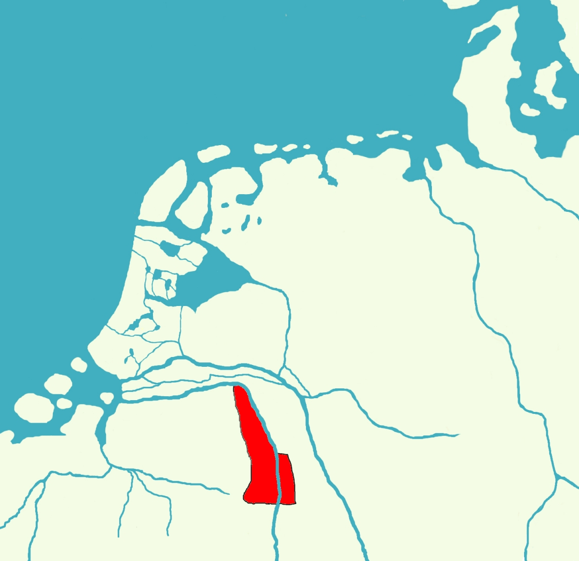 Eigen werk. Ligging van de Maasgouw in het Frankische Rijk. Gemaakt door Sindala op 28 maart 2007.